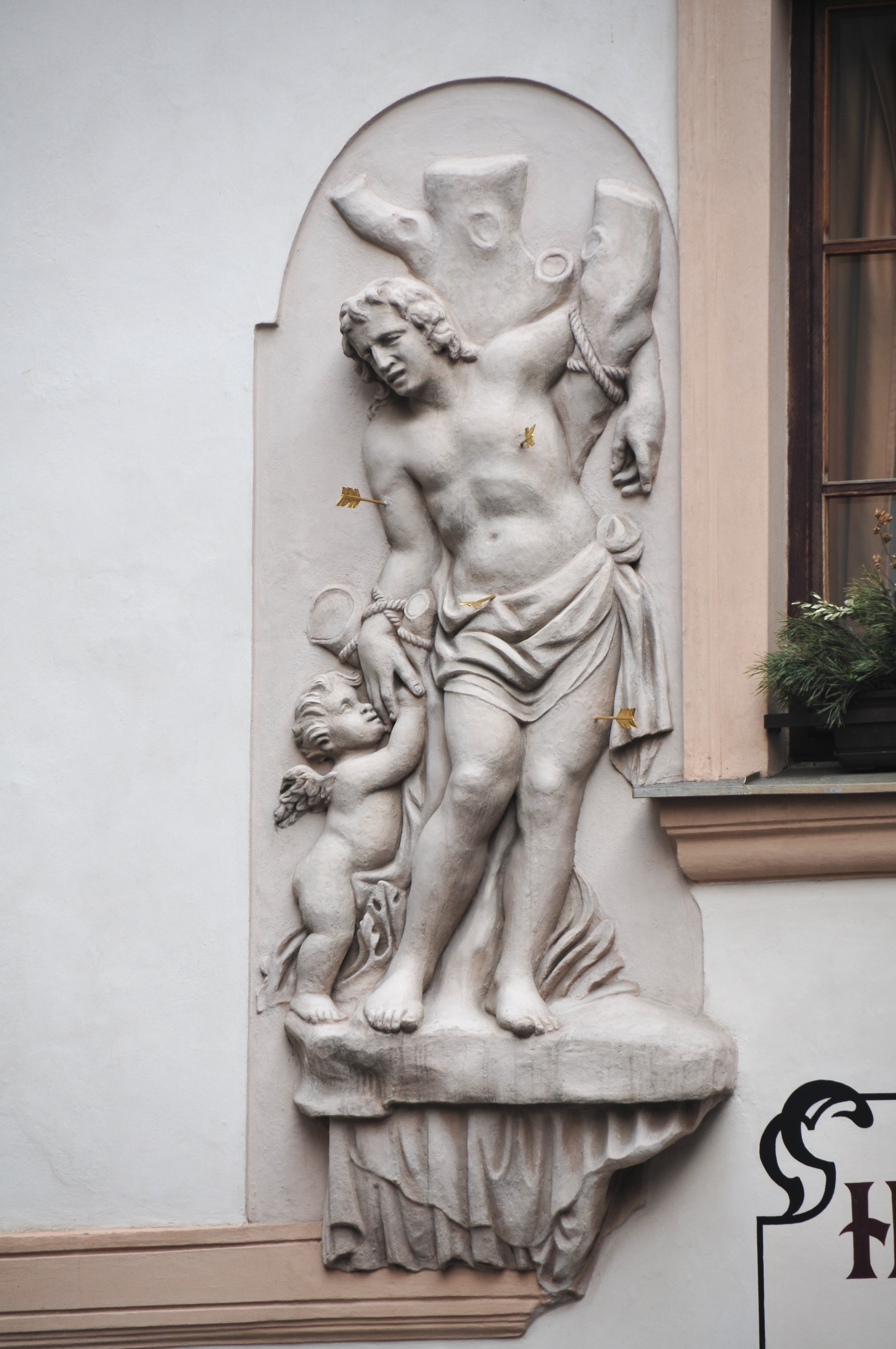 Prag